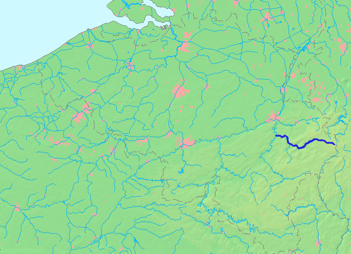 Kaart van de Amblève op basis van Wikimedia Commons kaart MapBelgiumWater